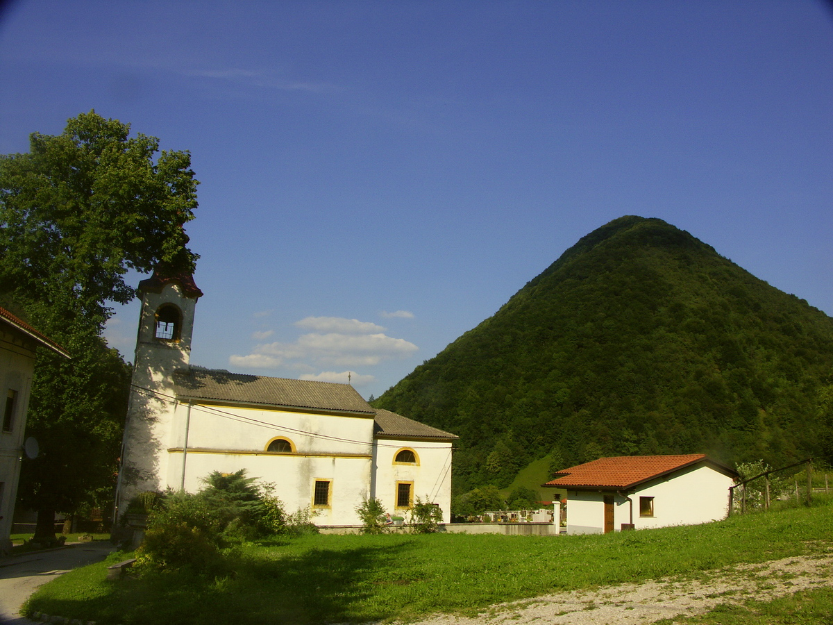 Cerkev svetega Jakoba v Dolenji Trebuši s Kukom v ozadju.